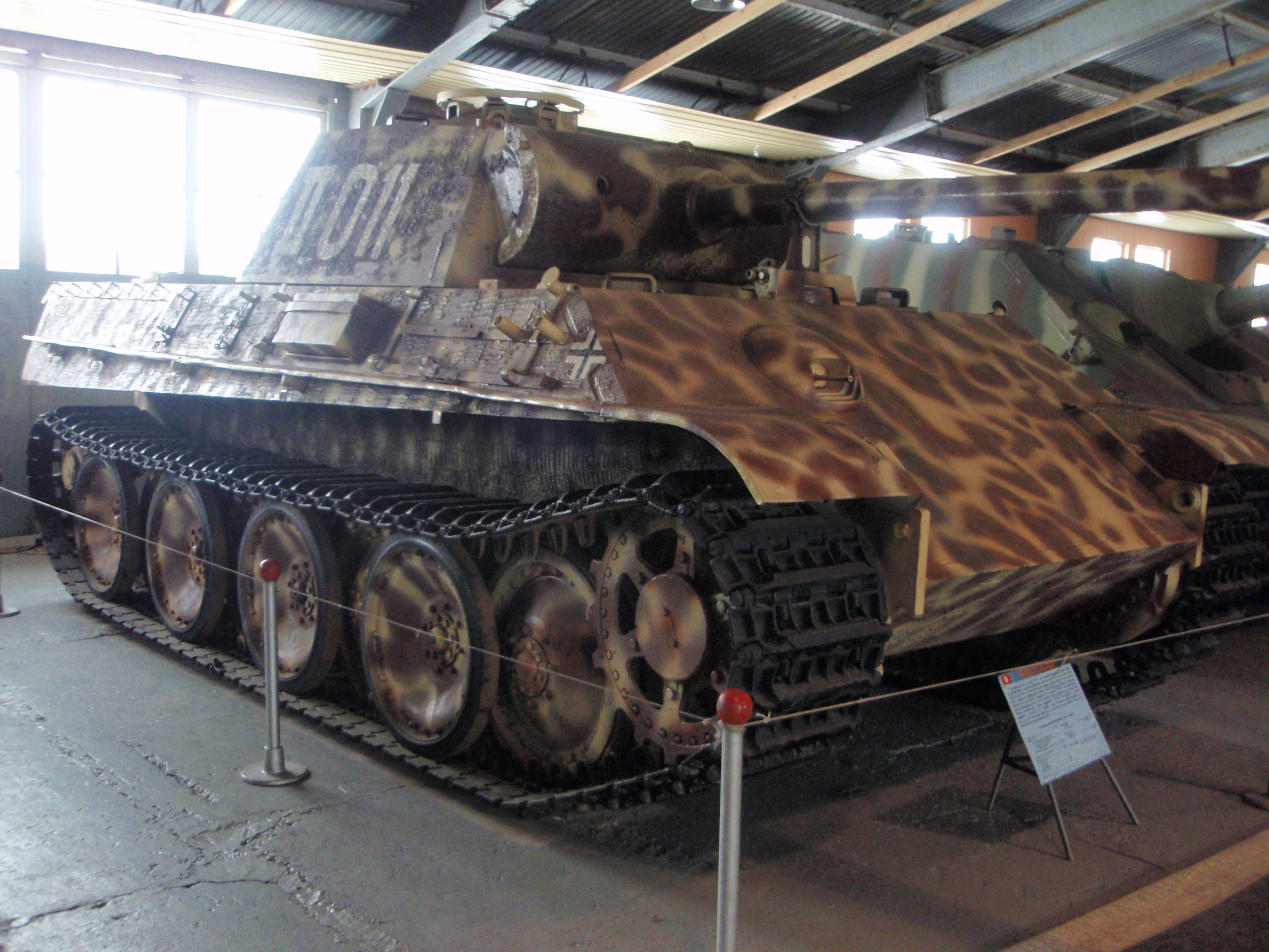 Немецкий средний танк Pz.V (Panther) в Кубинке